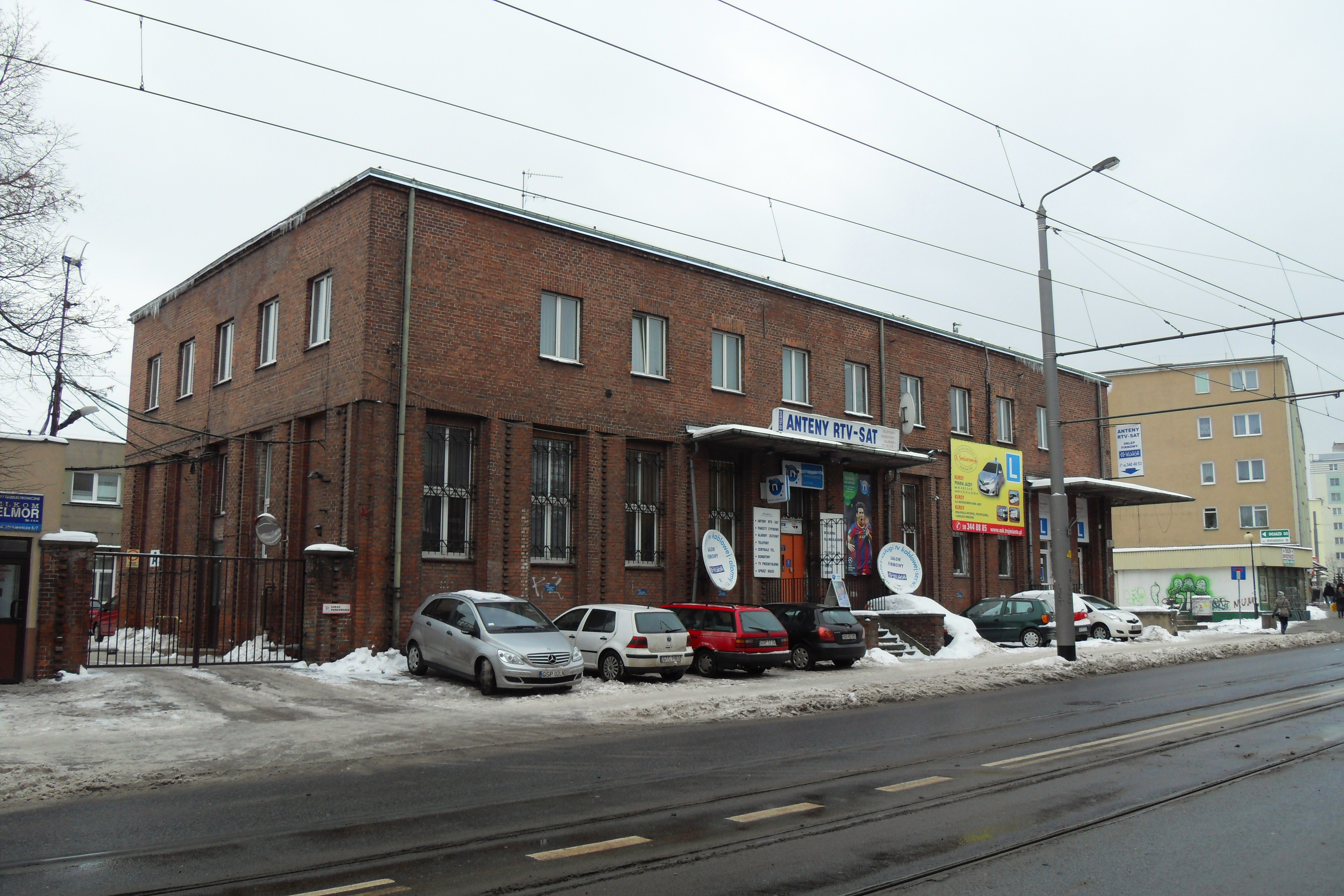 Gdańsk Wrzeszcz Dolny. Ul. Mickiewicza 5, dawna poczta, architekt: Adolf Bielefeldt (